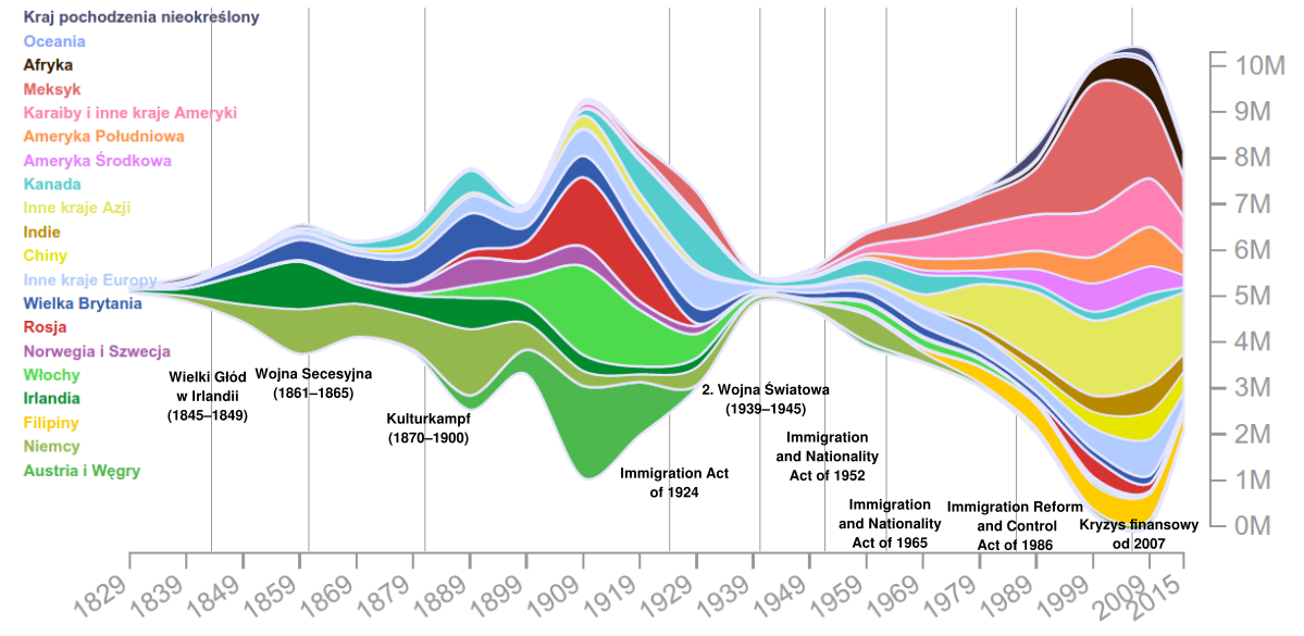 Wizualizacja krajów pochodzenia imigrantów do Stanów Zjednoczonych. Modyfikacja (tłumaczenie i dodanie legendy) objętej licencją CC-BY wizualizacji autorstwa Natalii Bronshtein z legenda inspirowana według